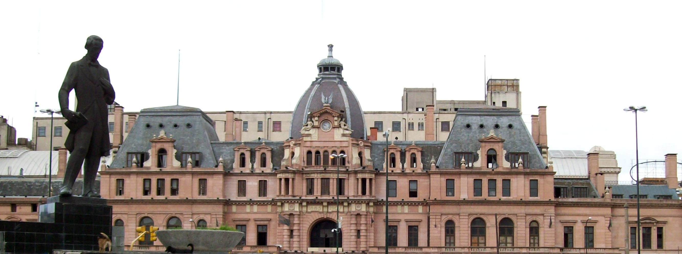 Panoramica Alberdi con la estación Constitución de fondo.